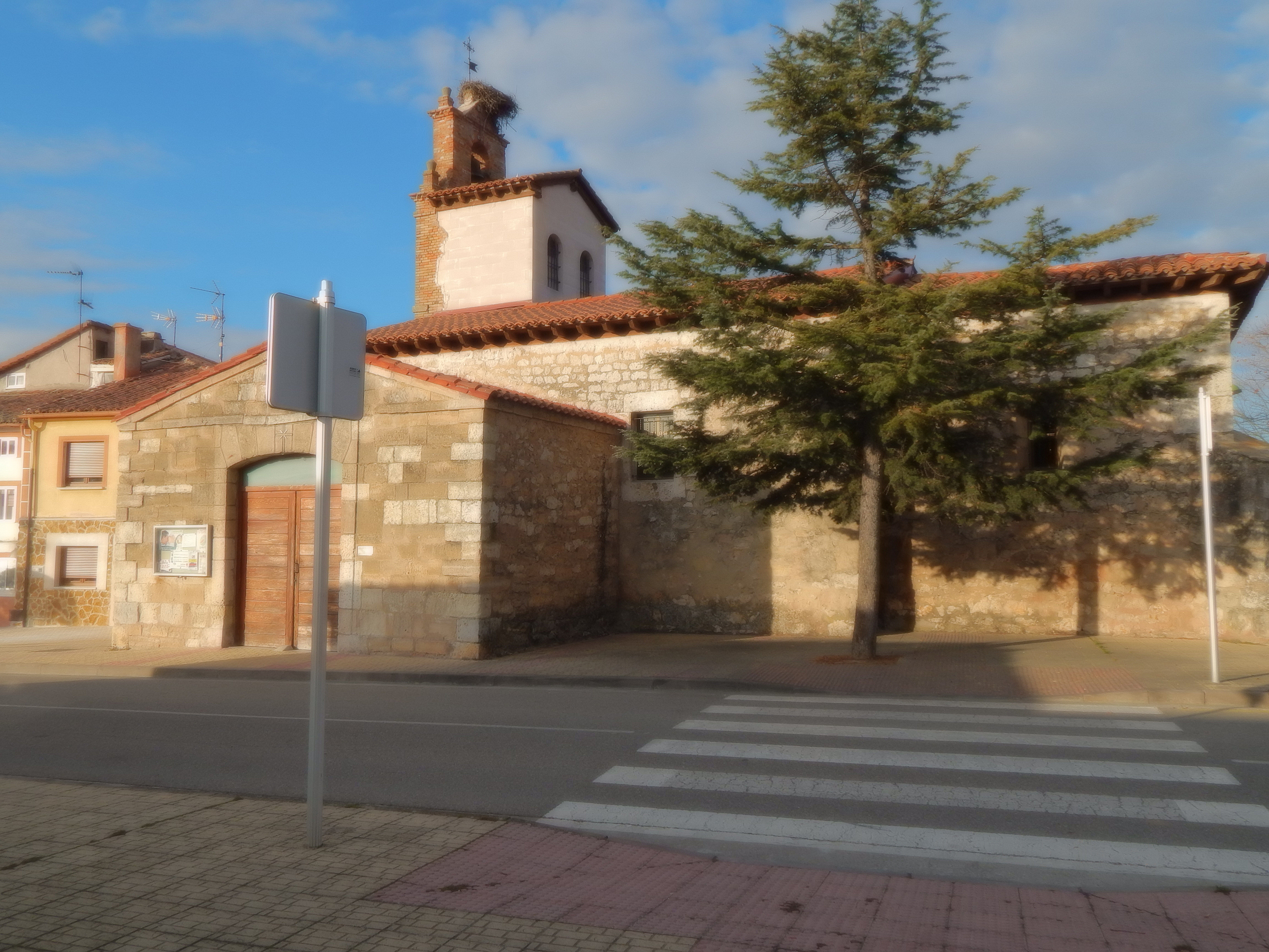 Fachada de la Iglesia de Castañares